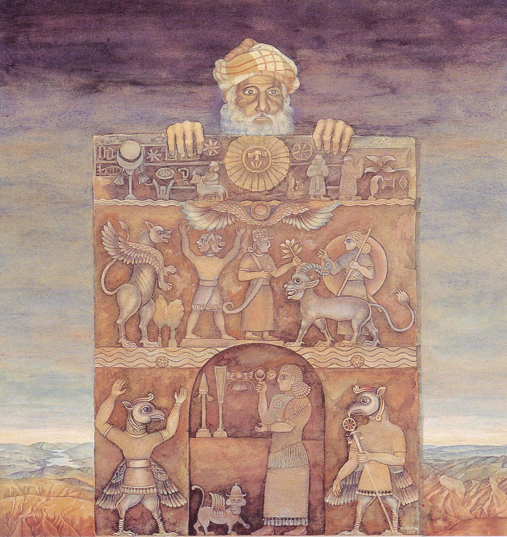 Mahmut Celayir: Gedenkstein, Mischtechnik auf Papier, 40 x 35 cm, 1982.